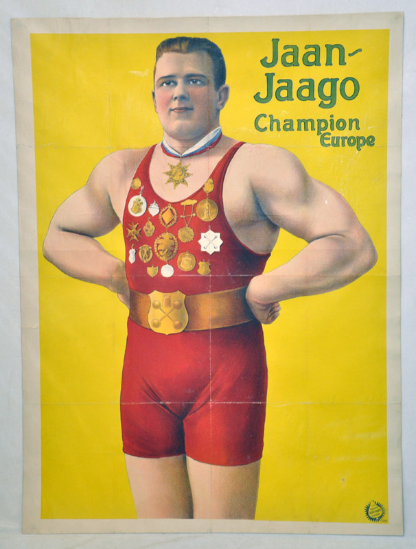 MuuseumikoguPlakatidOlemusplakatOriginaaloriginaalSäilivusrahuldavEraldatavad osadMõõdud kõrgus: 95.0 cm; laius: 70.0 cm pealkiri Jaan Jaago Champion Europe: reklaamplakat.- [Hamburg], [192-]